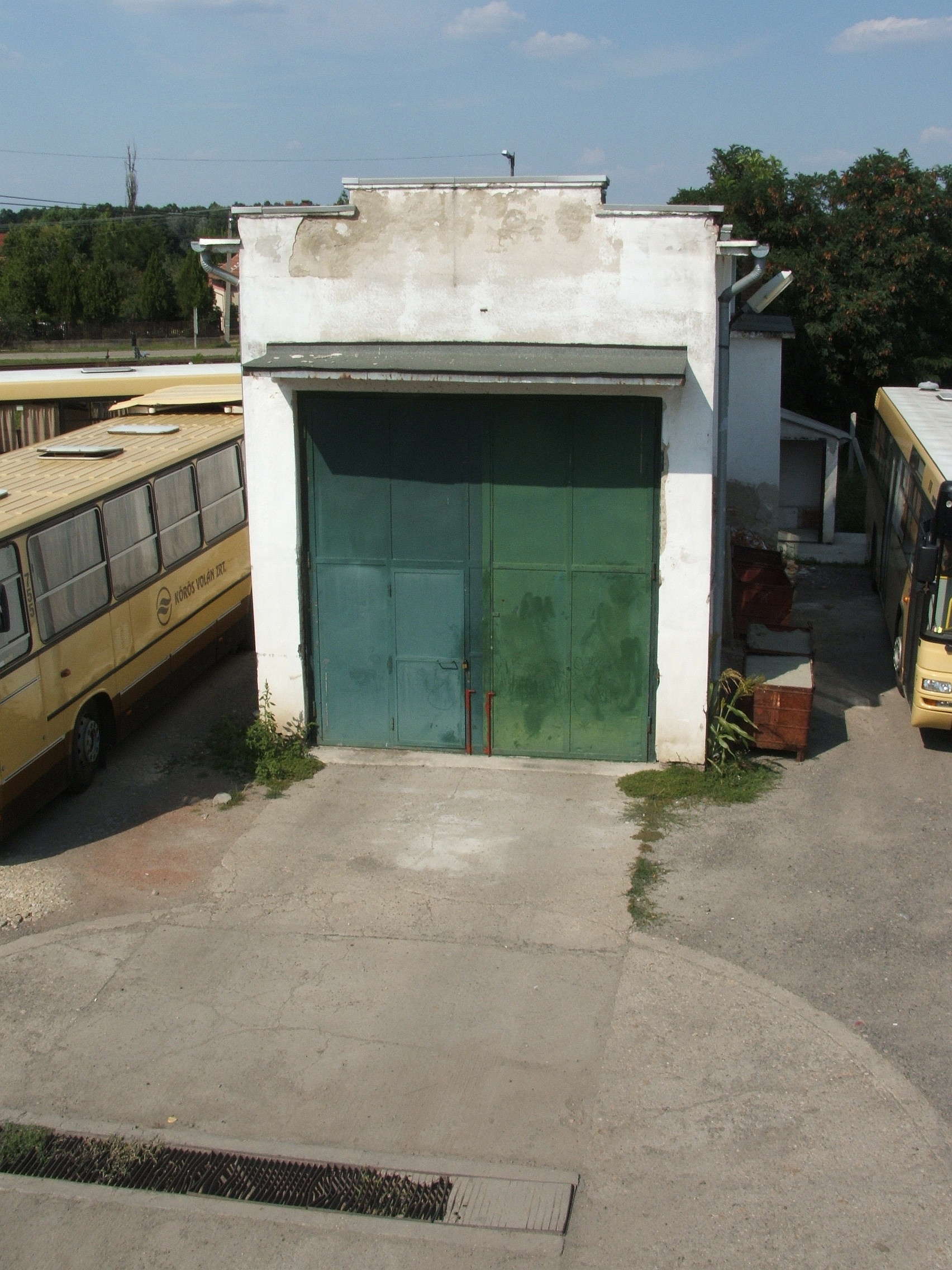 AEGV (MÁV AK) fűtőház Vésztőn